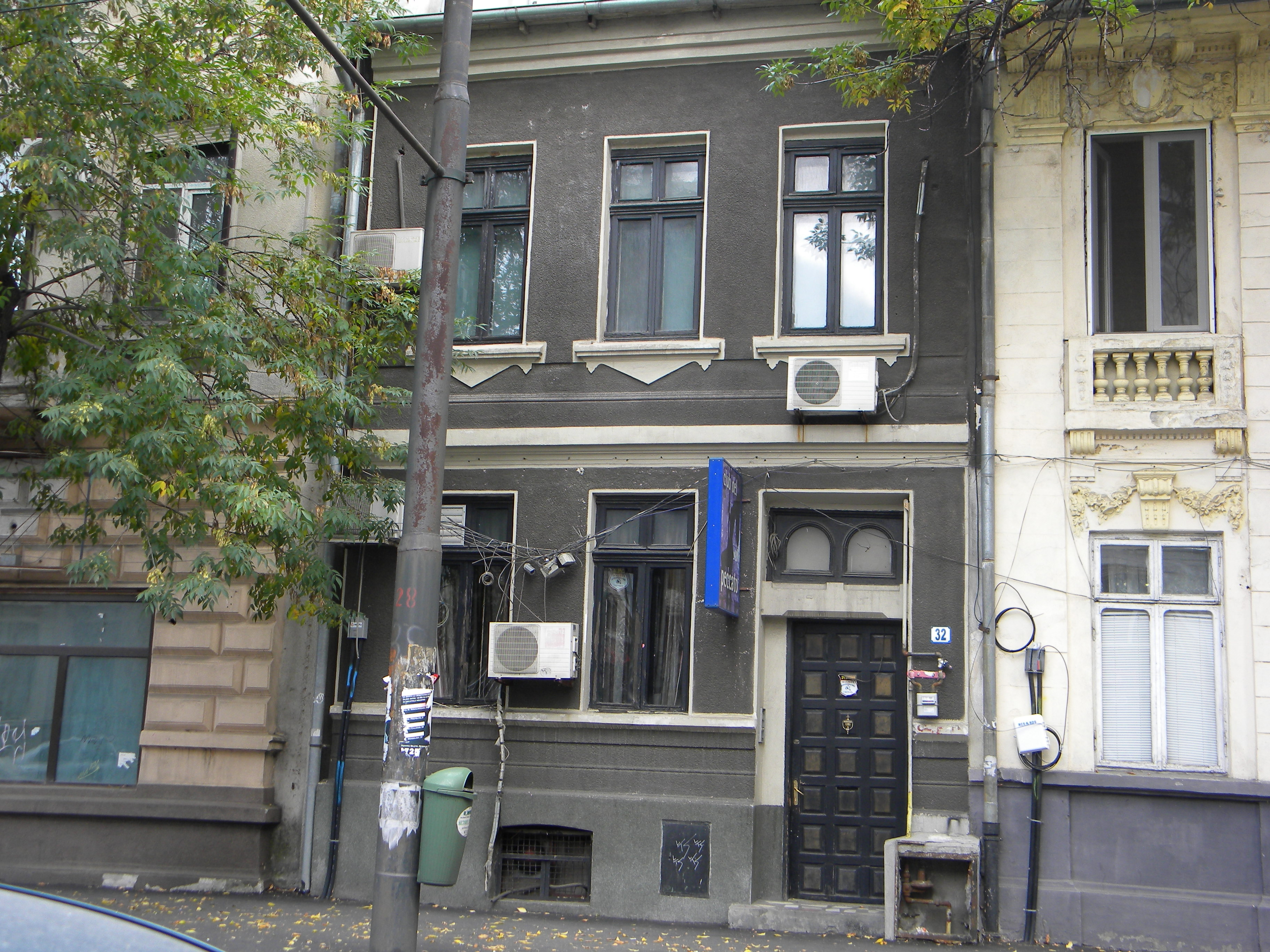 Bucuresti, Romania, Casa pe Calea Grivitei nr. 32, sect. 1